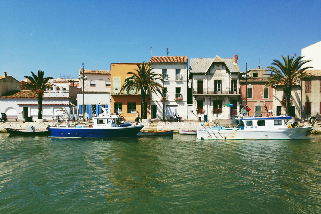 Набережная.